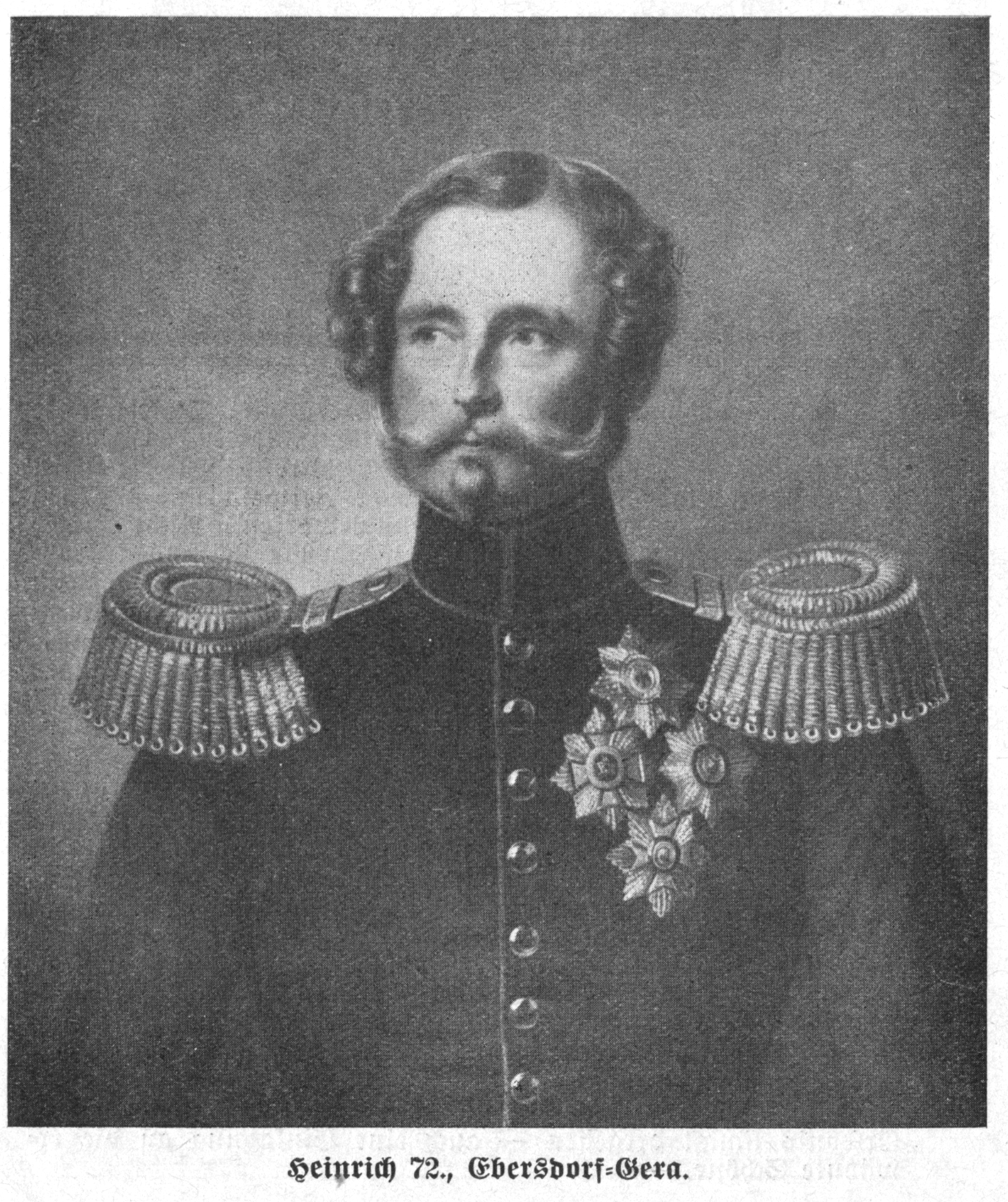 Portraitdarstellung von Heinrich LXXII. Reuß Ebersdorf-Gera - in Uniform